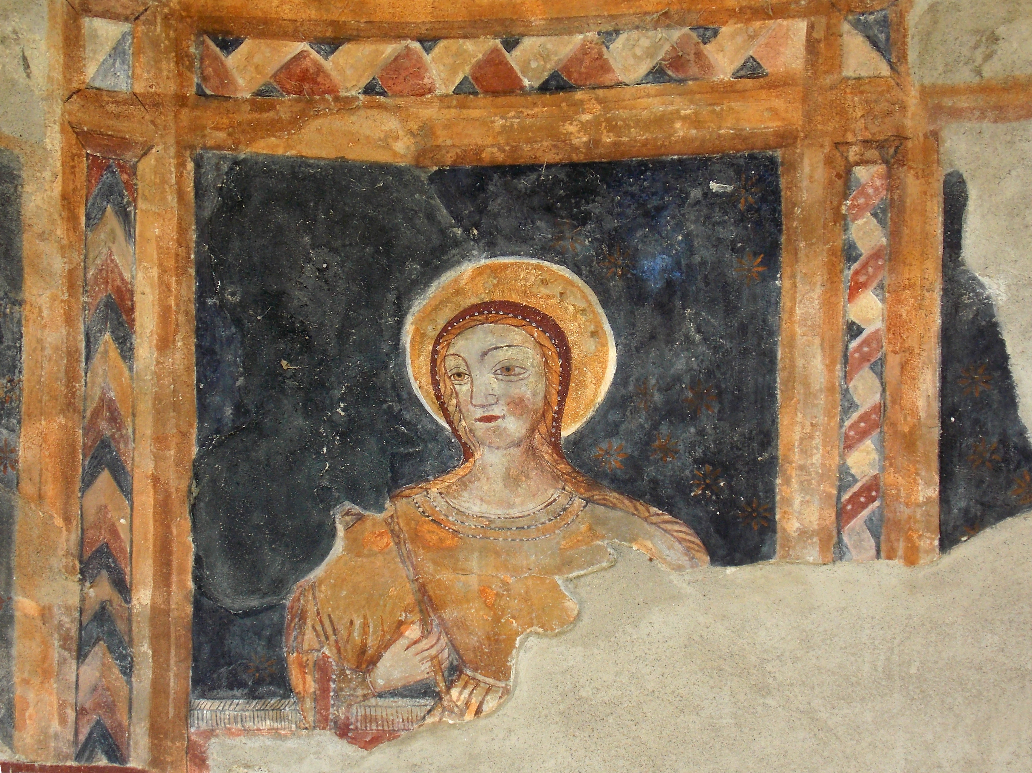 I ruderi dell'abside dell'oratorio di San Giorgio a Faicchio (BN) con gli affreschi, dipinti fra il X e il XV secolo